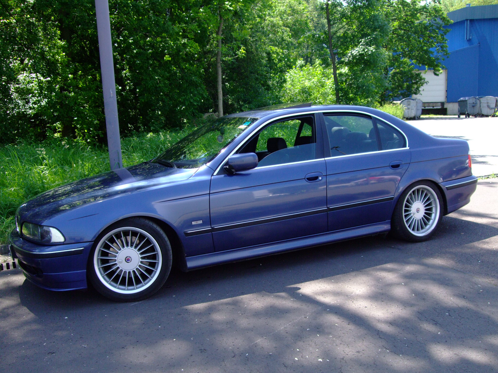 BMW Alpina B10V8. VII Zlot BMW Mania w Katowicach.